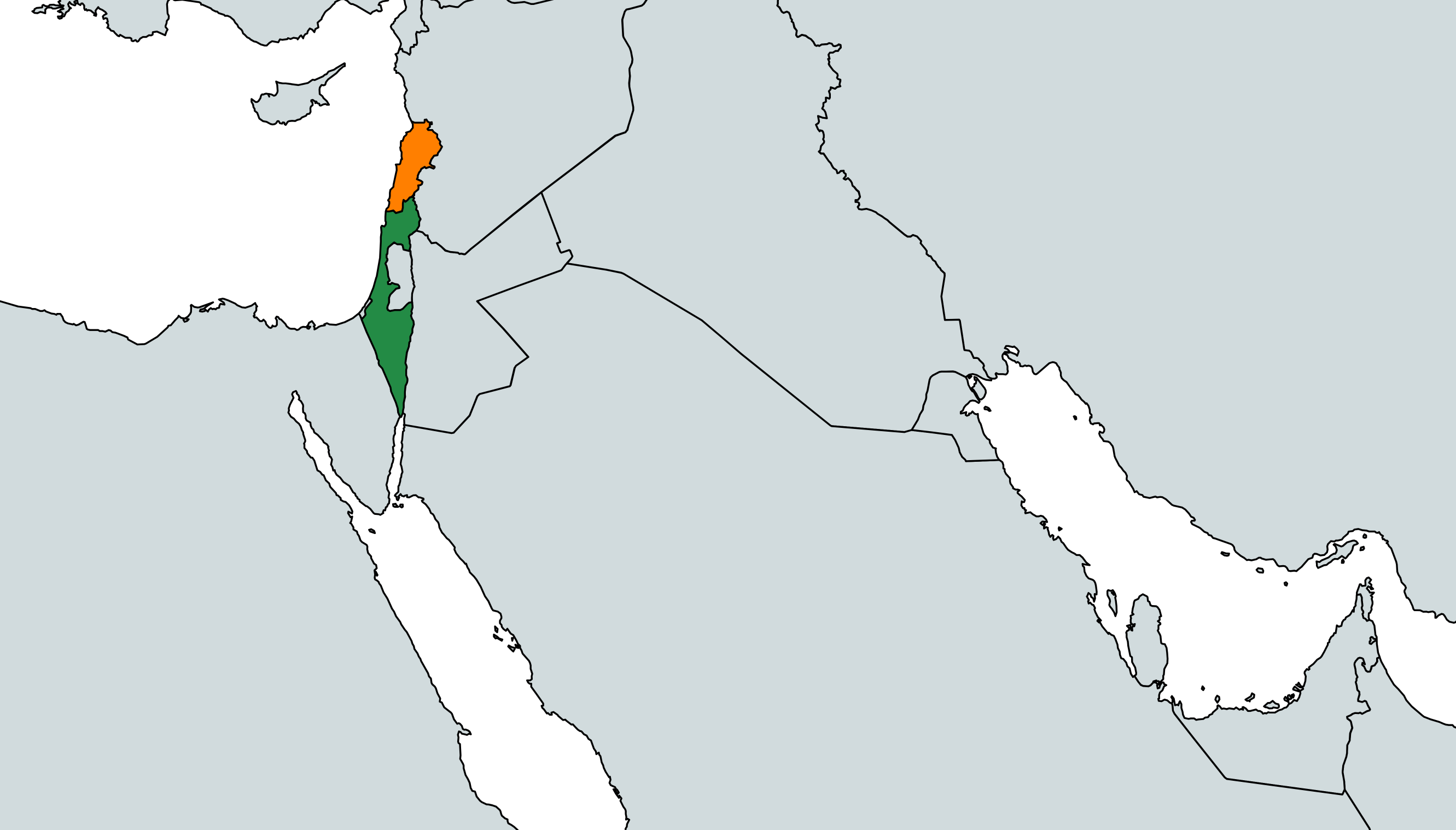 Locator